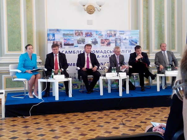 "Вітальні ремарки" Зліва-направо: Ольга Гресько, к.ф.н., доцент кафедри телебачення і радіомовлення Інституту журналістики КНУ ім. Т.Шевченка, Гвідас Керушаускас, заступник голови місії, радник-посланник, Посольство Литовської Республіки в Україні, Контактне Посольство НАТО в Україні, Сергій Джердж, к.п.н., голова Громадської ліги Україна-НАТО, Ігор Долгов, заступник Міністра оборони України з питань європейської інтеграції, Олександр Литвиненко, д.п.н., заступник Секретаря Ради національної безпеки і оборони України, Володимир Щелкунов, президент ІСС Ukraine, голова Громадської ради при МЗС України, радник Прем'єр-міністра України